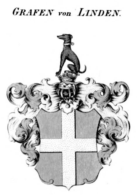 Wappen Linden - Tyroff HA.jpg